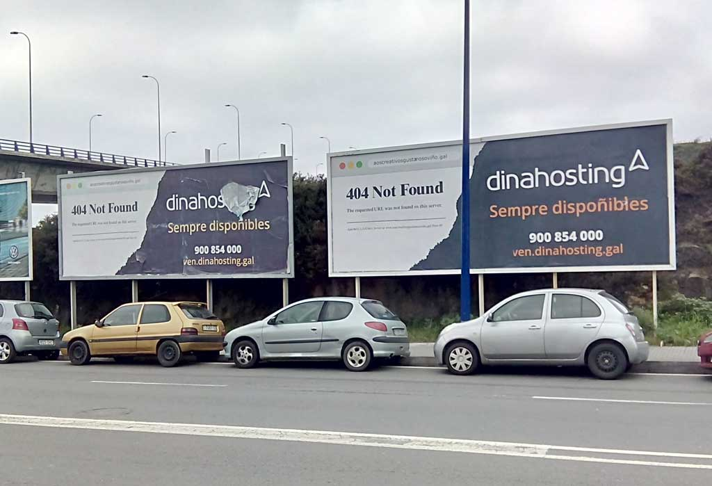 Publicidade de Dinahosting na Grela-Bens, A Coruña.